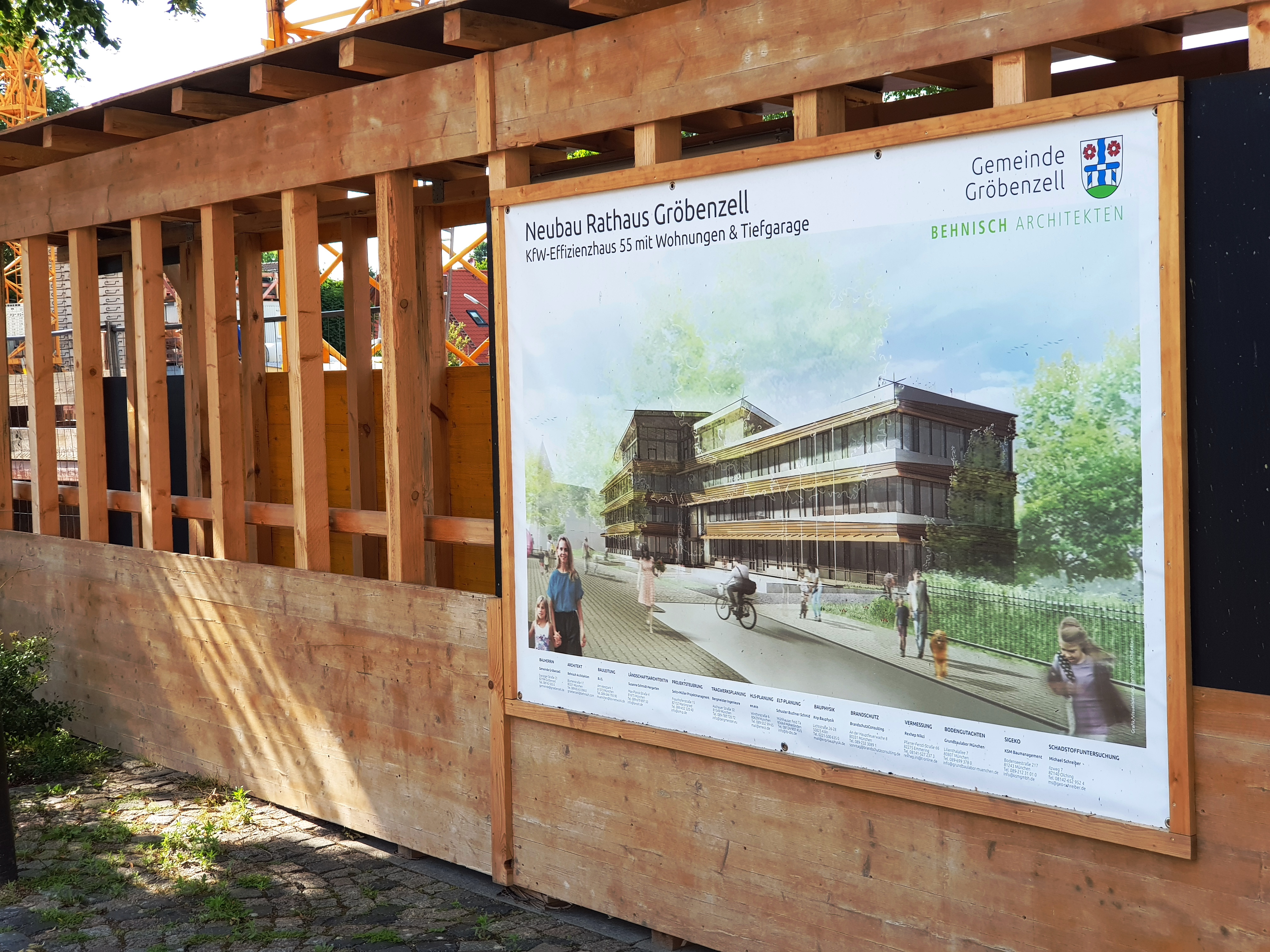 Deutschland, Bayern, Oberbayern, Landkreis Fürstenfeldbruck, Gemeinde Gröbenzell, Neubau des Rathauses, Juni 2019